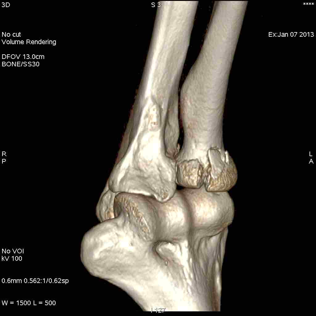 Volume Rendering einer Radiusköpfchenfraktur